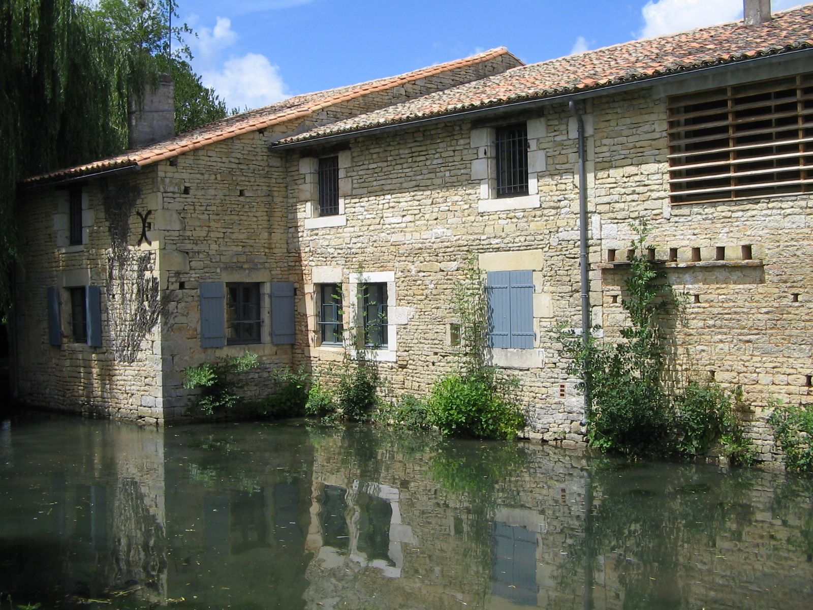 le moulin de Lezay (79) en juin 2011